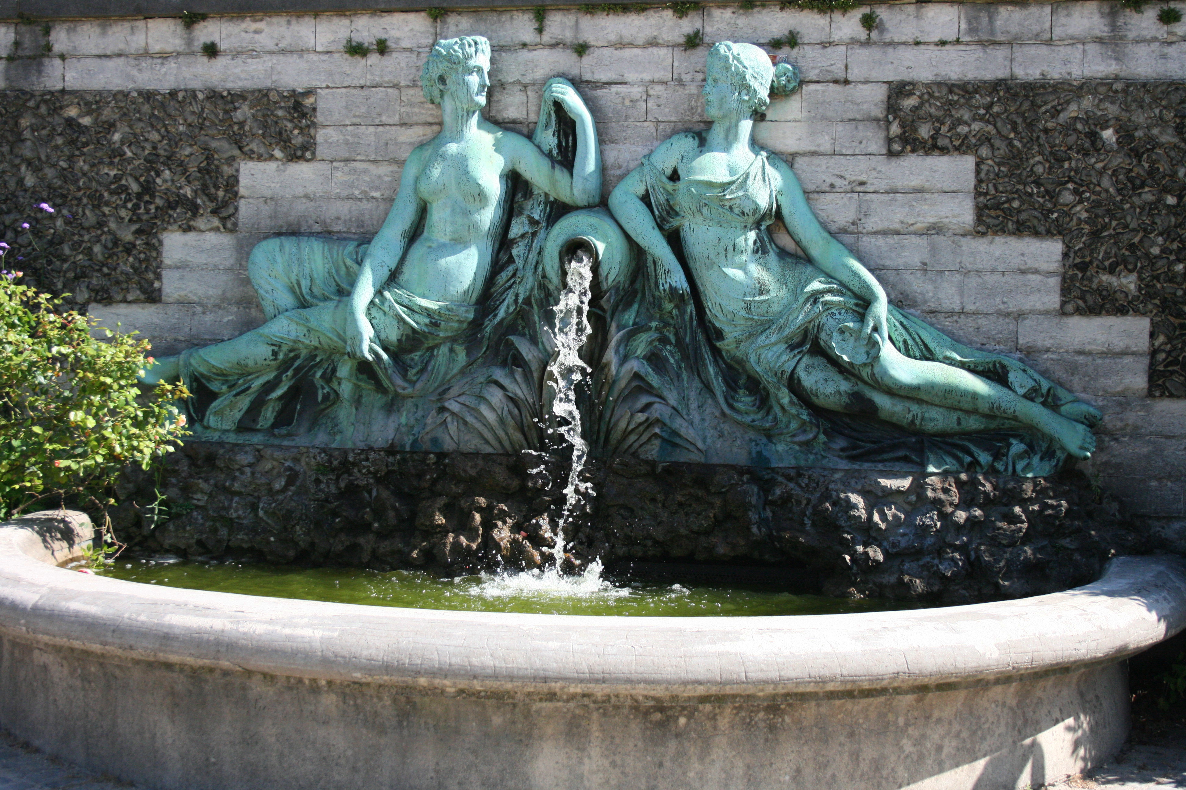 Jardin botanique de Bruxelles. Les Deux Nymphes entourant une source, de Albert Hambresin, d'après fFançois Rude